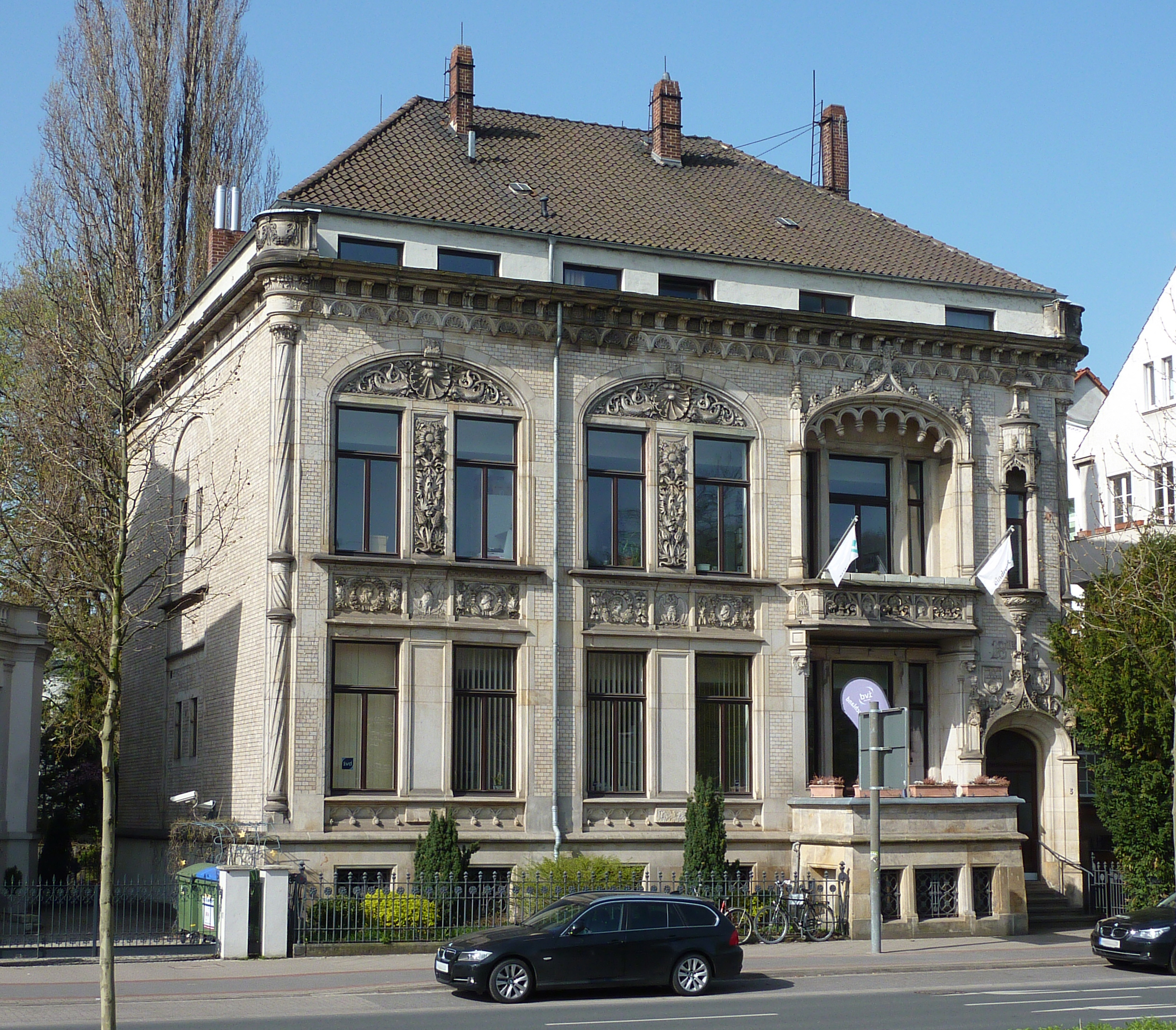 Die Villa Weiße Distel am Neuen Haus 3 (vormals am Neuenhause 3; Am Neuen Haus 3; Emmichplatz 3) in der Oststadt, Hannover